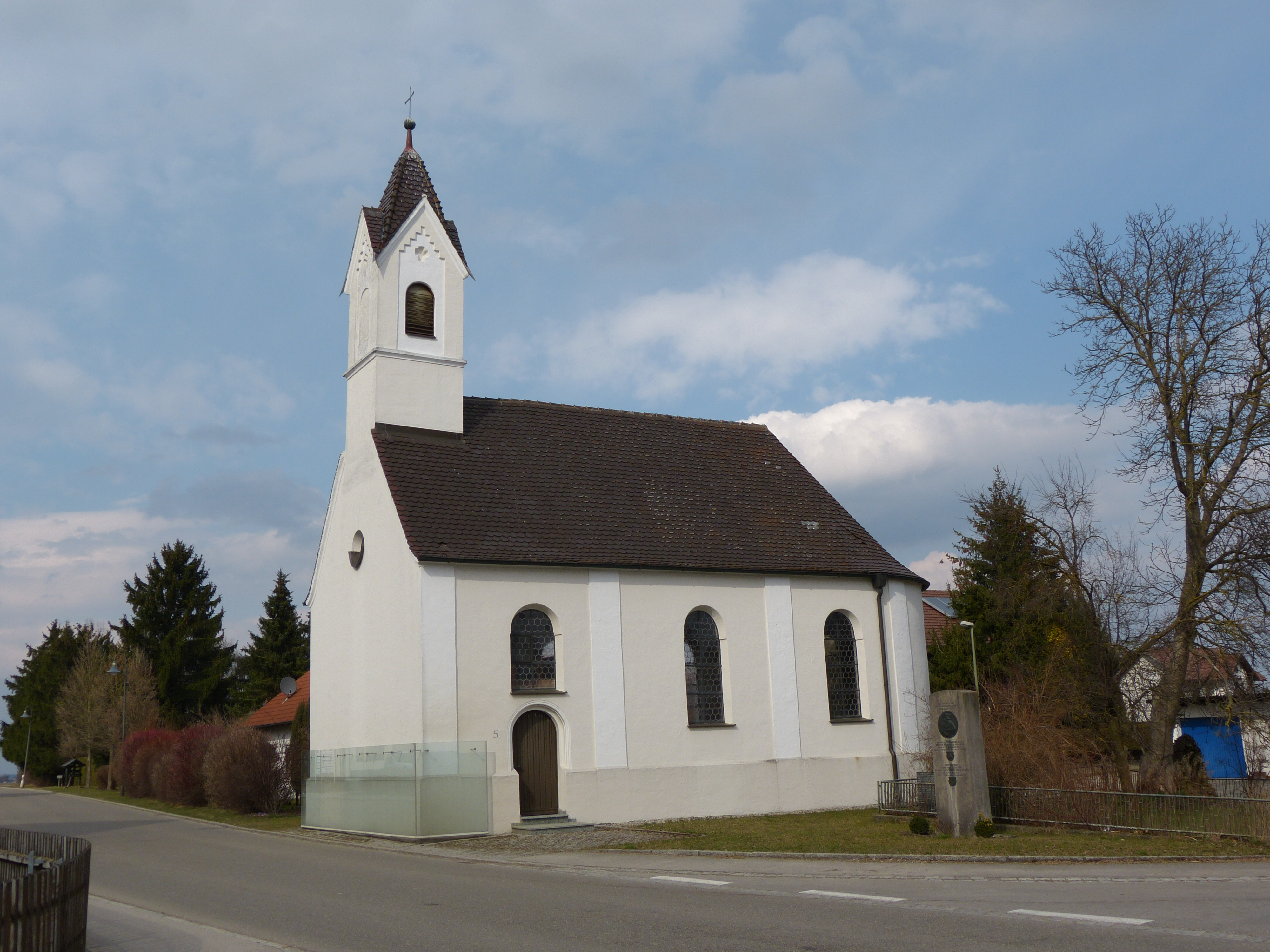 St. Rochus, Gemeinde Egg an der Günz, Landkreis Unterallgäu, Bayern